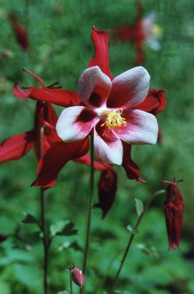 Aquilegia 'Red Star'